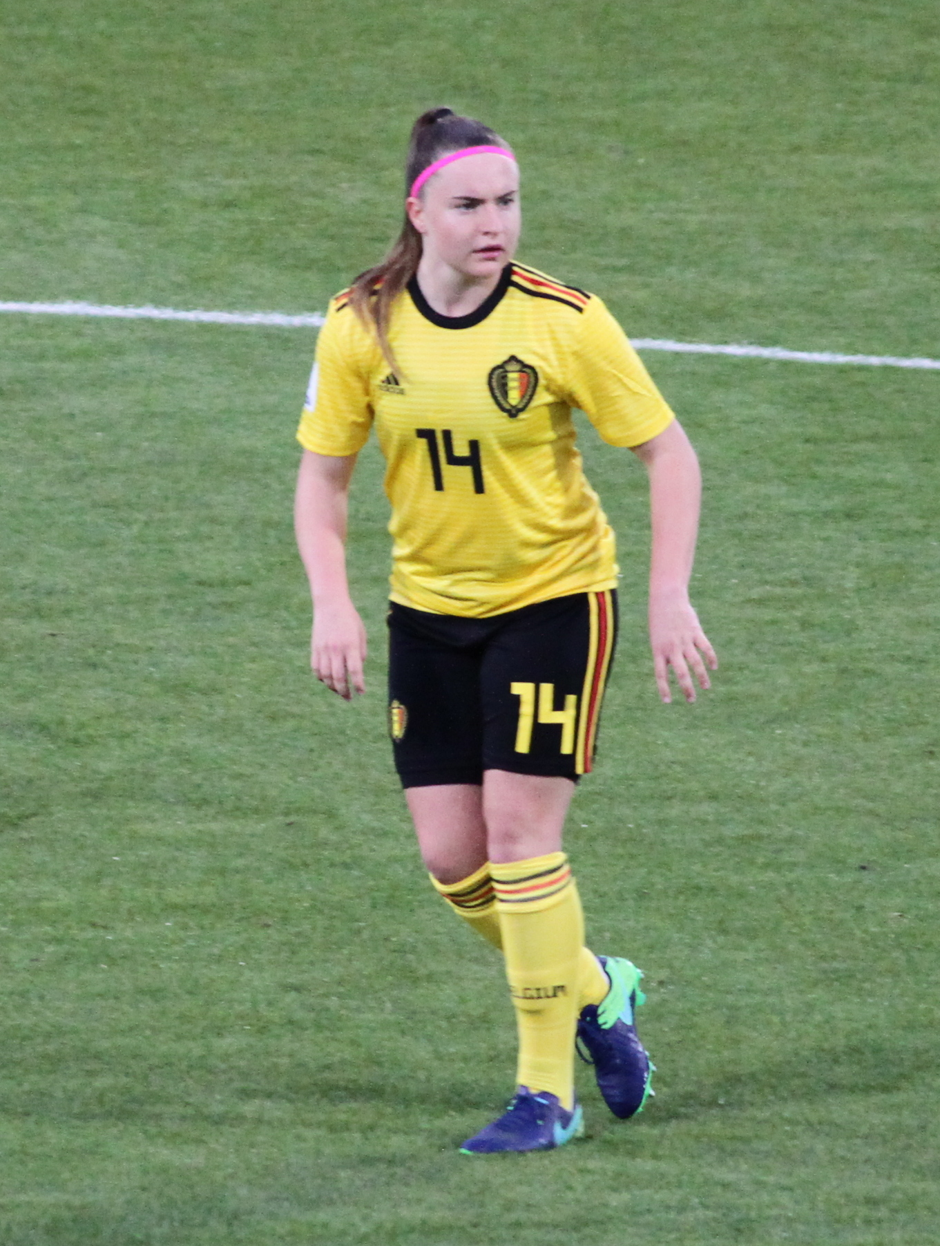 Davinia Vanmechelen, nazionale di calcio femminile del Belgio, a fine incontro Italia-Belgio del 10 aprile 2018 allo stadio Mazza di Ferrara.